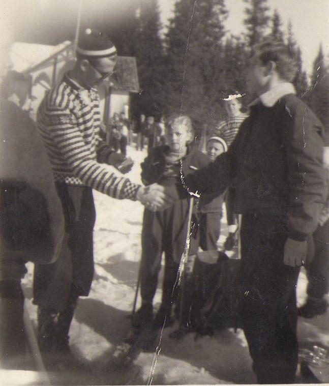 Her mottar vinneren av det første Ullsjøløpet i 1956, Henry Engeli førstepremien av Sverre Bakke.